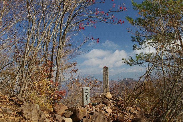 深田久弥終焉の地（芽ガ岳）